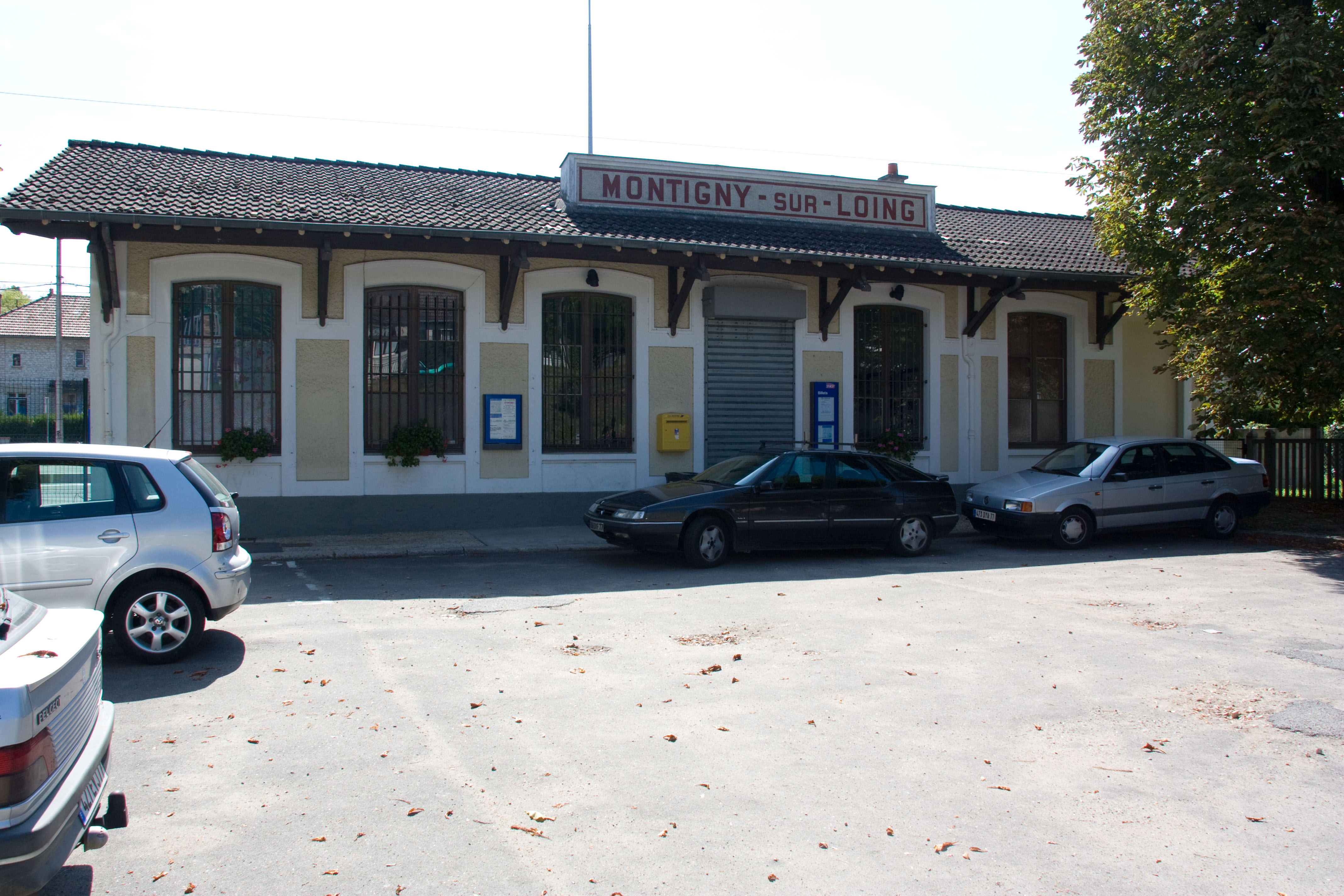 Gare de Montigny-sur-Loing. Montigny-sur-Loing, Seine-et-Marne, France.